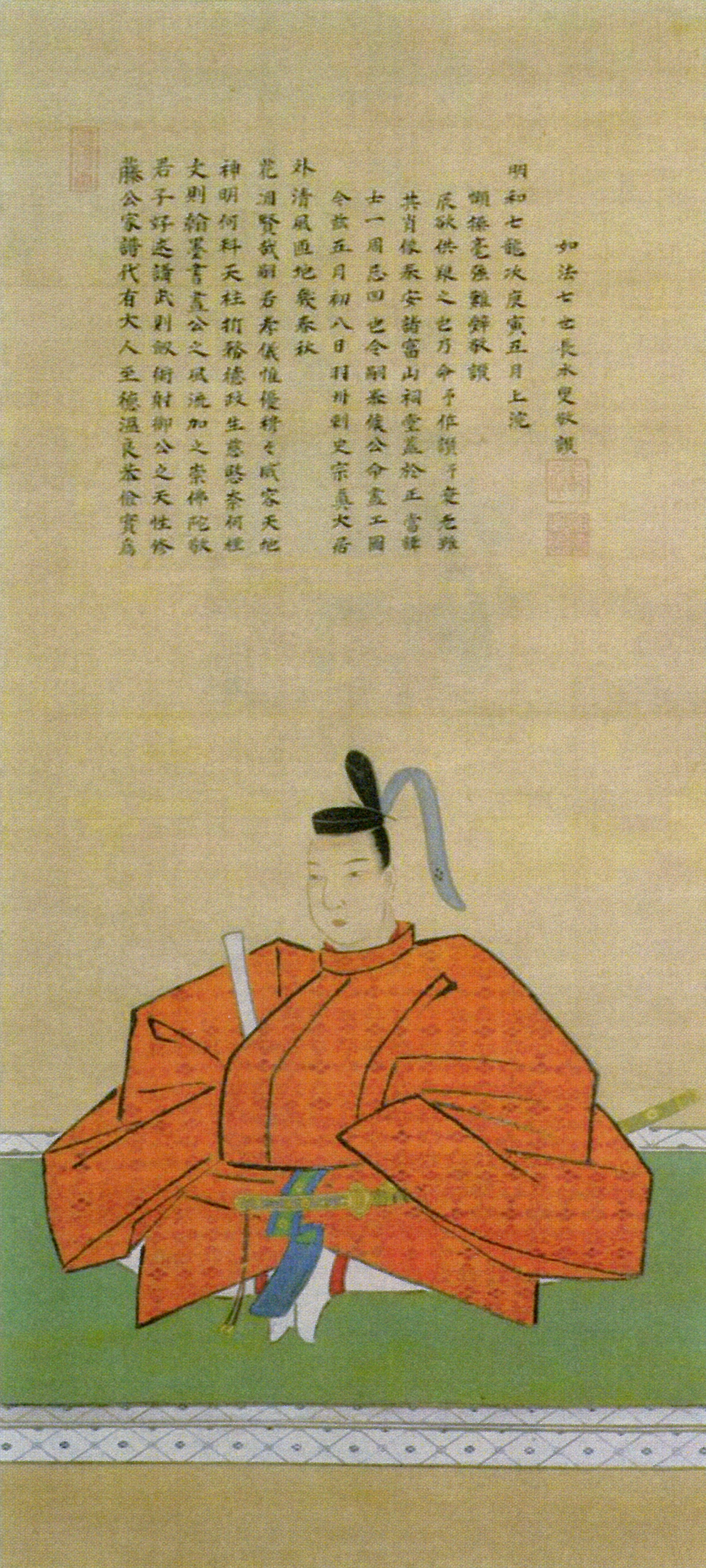 加藤泰行の肖像。